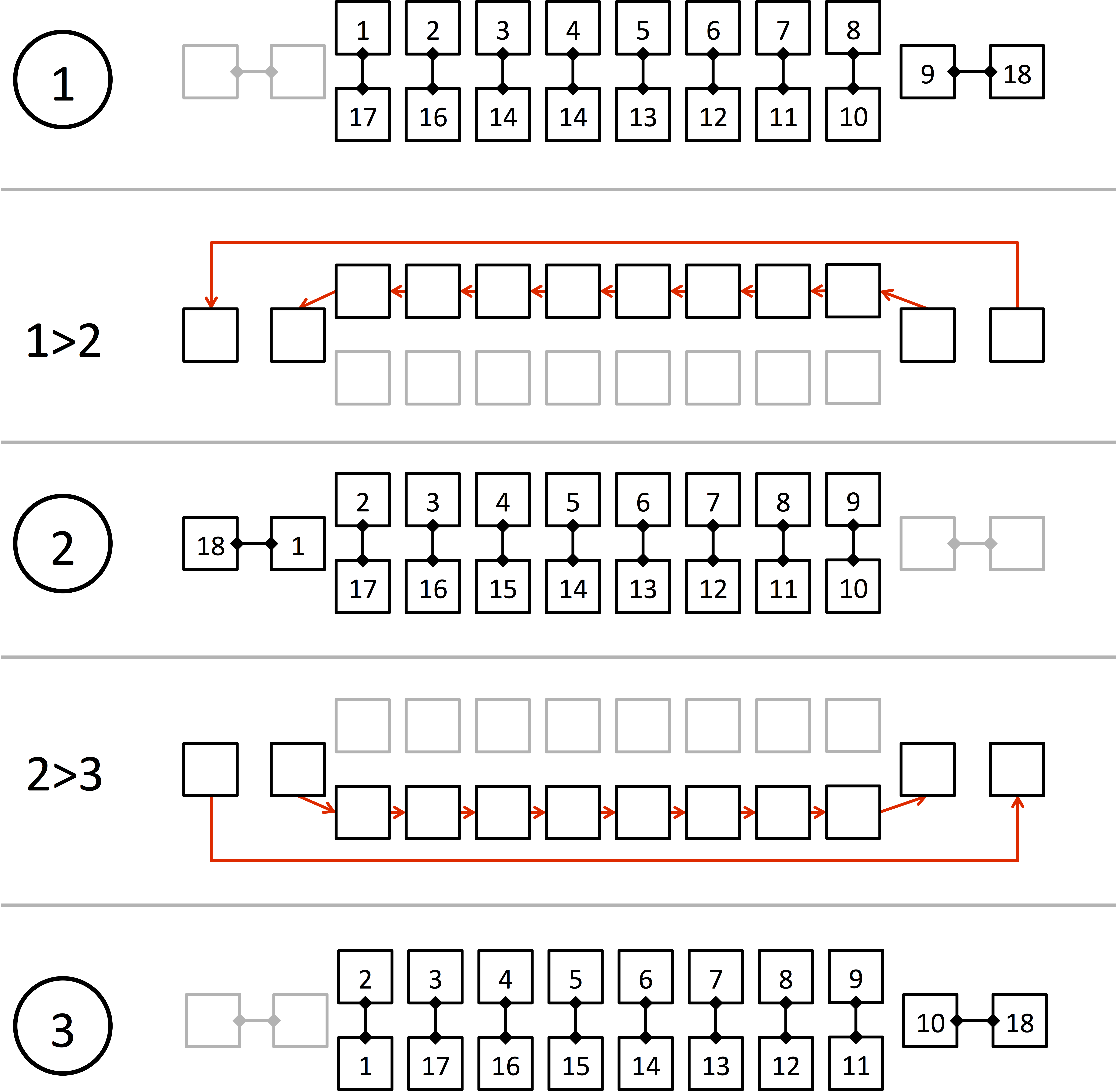 Strategie um den Spielplan der Fußballbundesliga zu erstellen